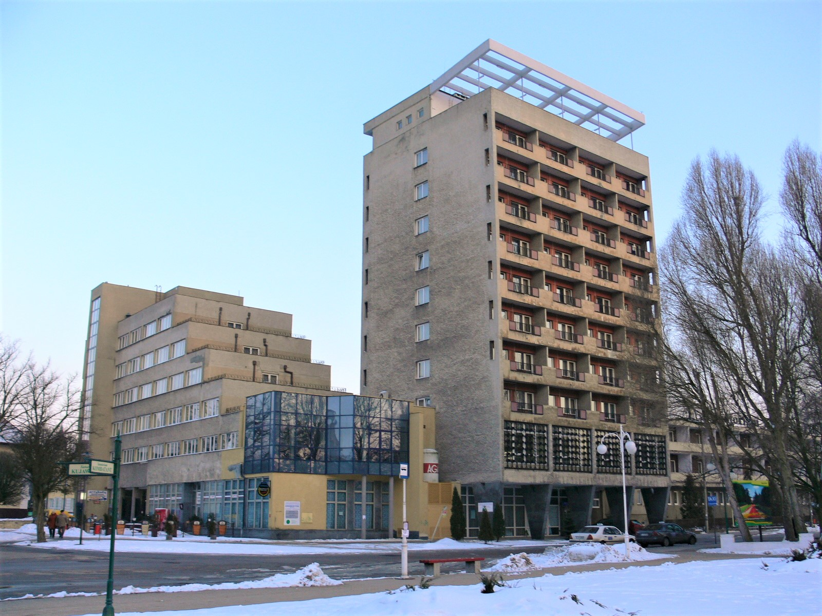 Sanatorium Energetyk.